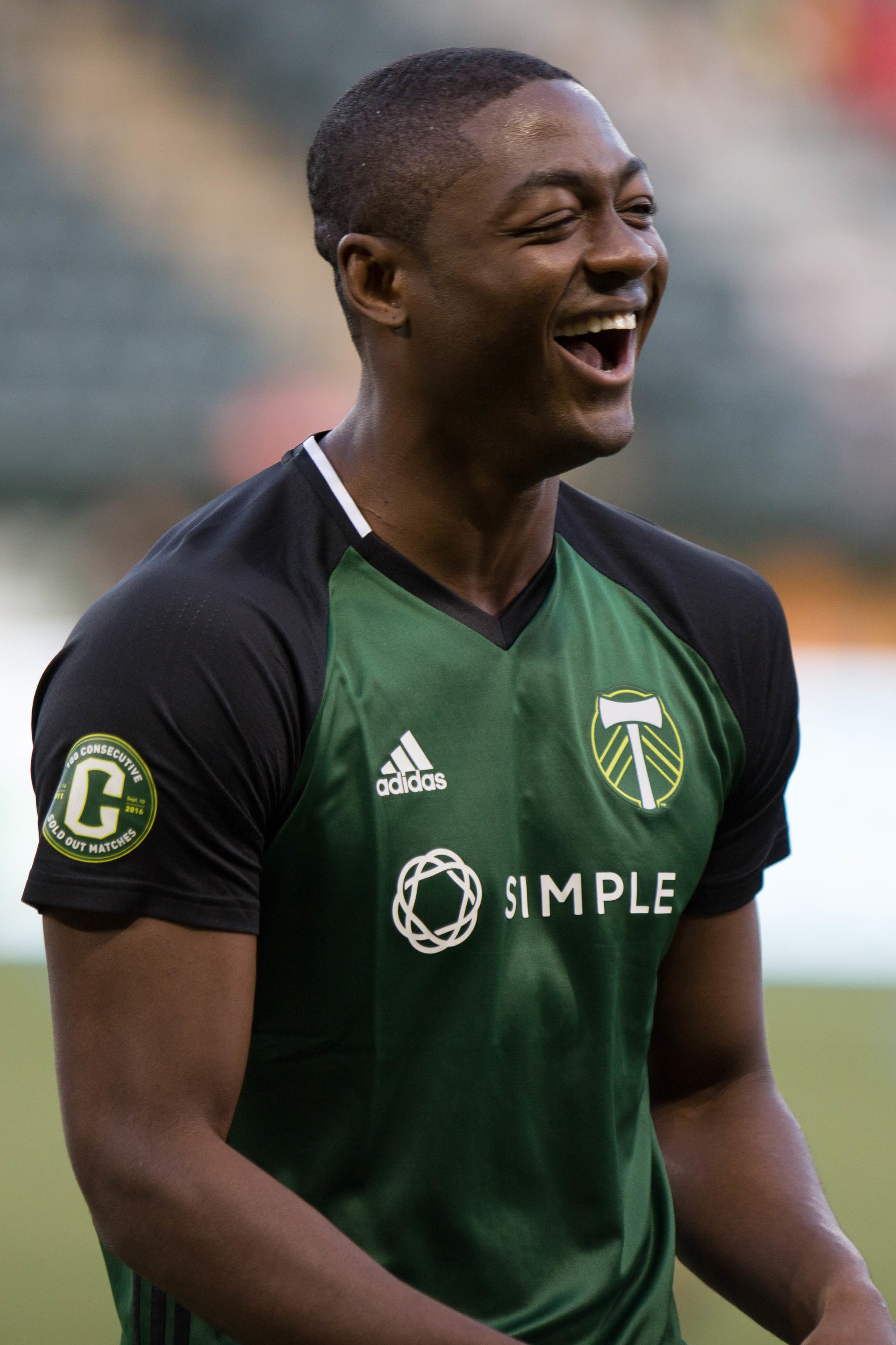 N42A3384.jpg